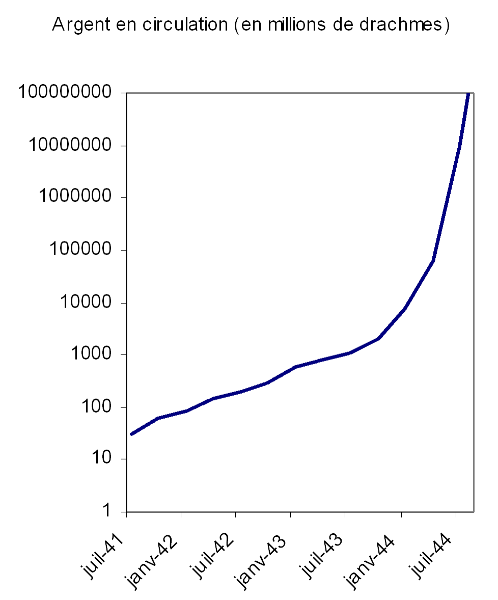 Inflation dans la Grèce occupée SOurce: Inspiré de Mark Mazower, Dans la Grèce Occupée